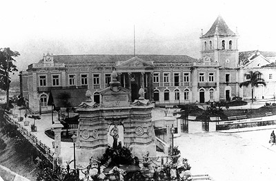 Palácio, Secretaria do Governo e Igreja do Colégio, em fotografia de 1887 (atual Pátio do Colégio)